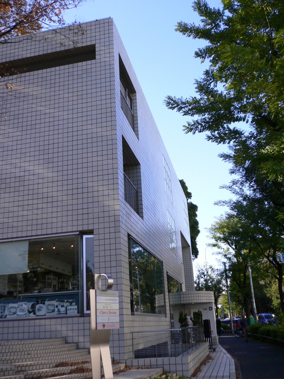 ヒルサイドテラス